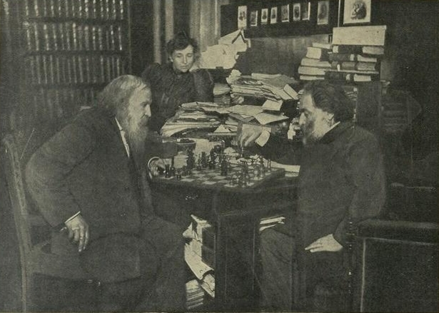 Куинджи и Менделеев за шахматами. Рядом со знаменитым русским ученым его жена, Анна Ивановна Менделеева.